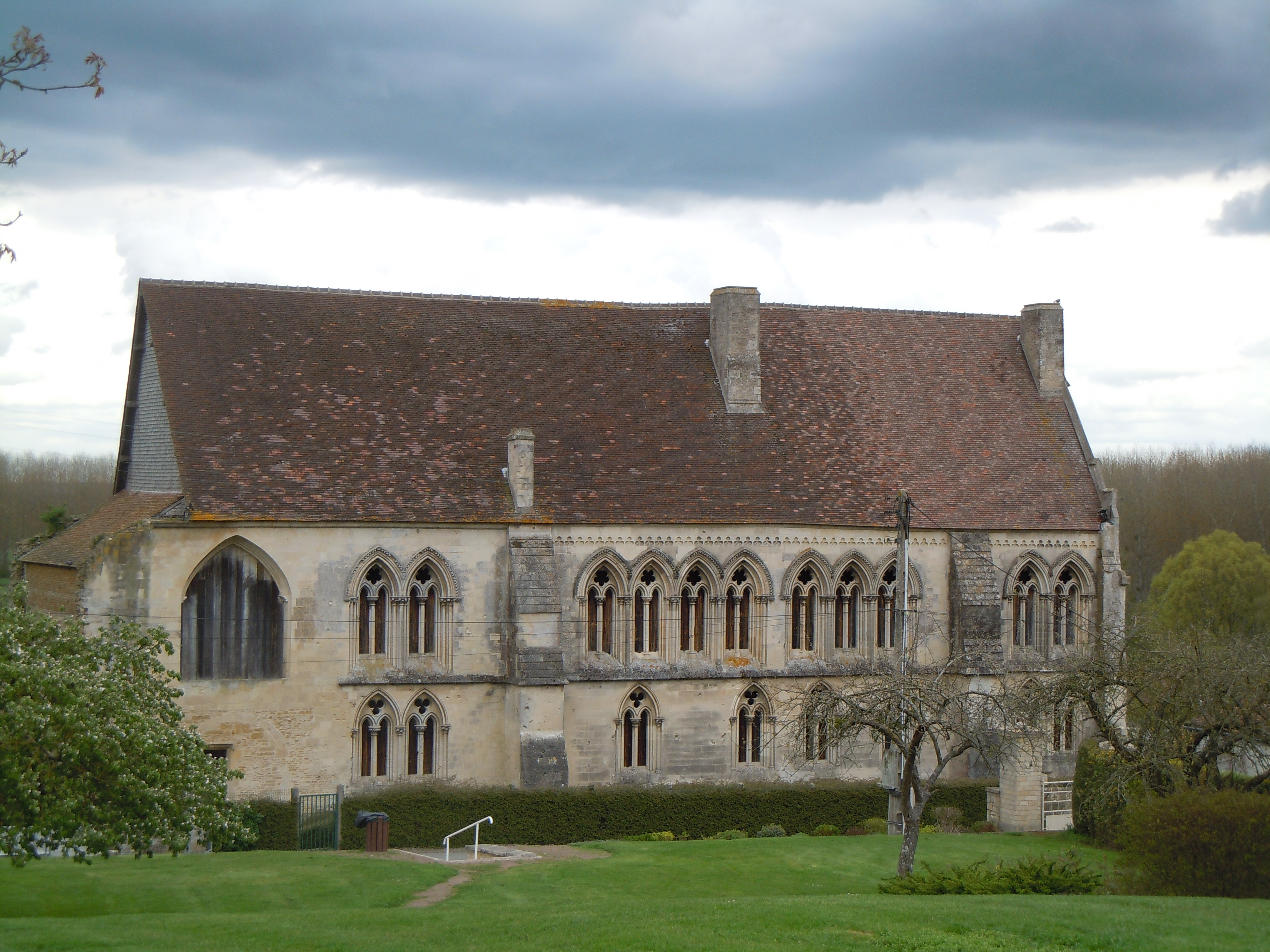 Abbaye Saint-Martin de Troarn